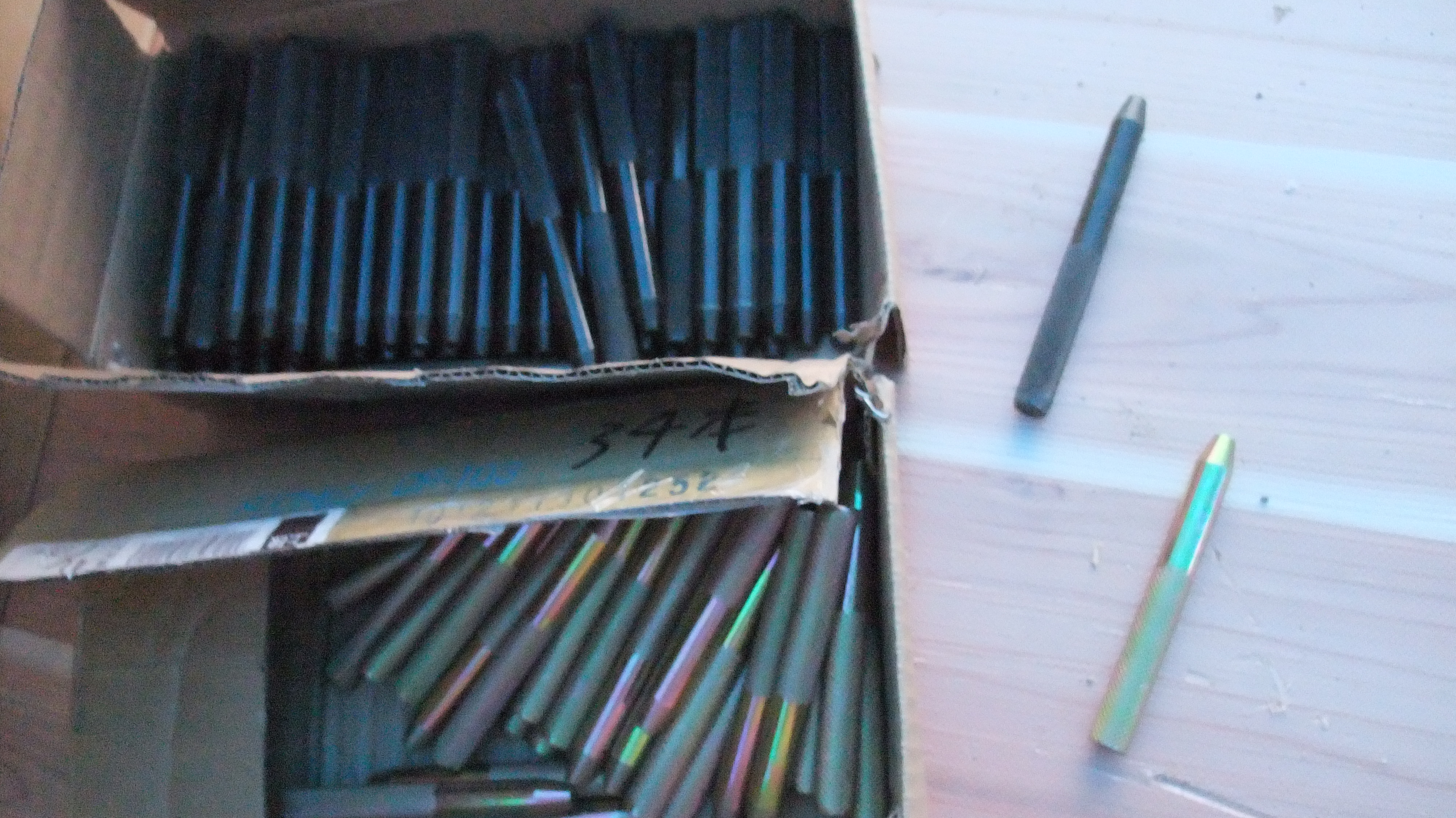 木造軸組み工法で、ピン結合に使用するドリフトピン。